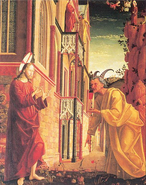 Temptation of Christlabel QS:Lru,"Искушение Христа. Алтарь святого Вольфганга." label QS:Len,"Temptation of Christ"